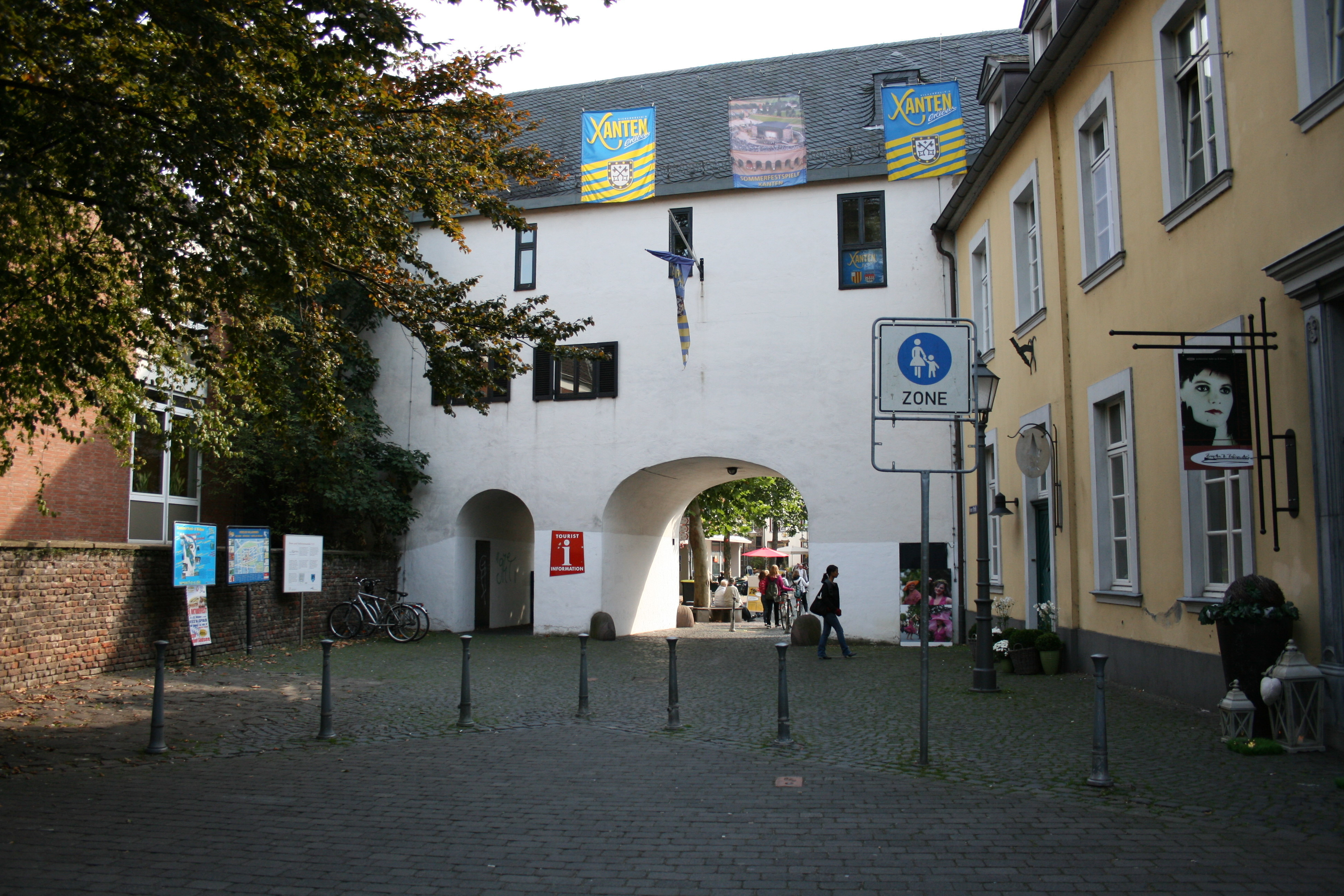 Mitteltor an der Klever Straße, Ecke Kurfürstenstraße in Xanten